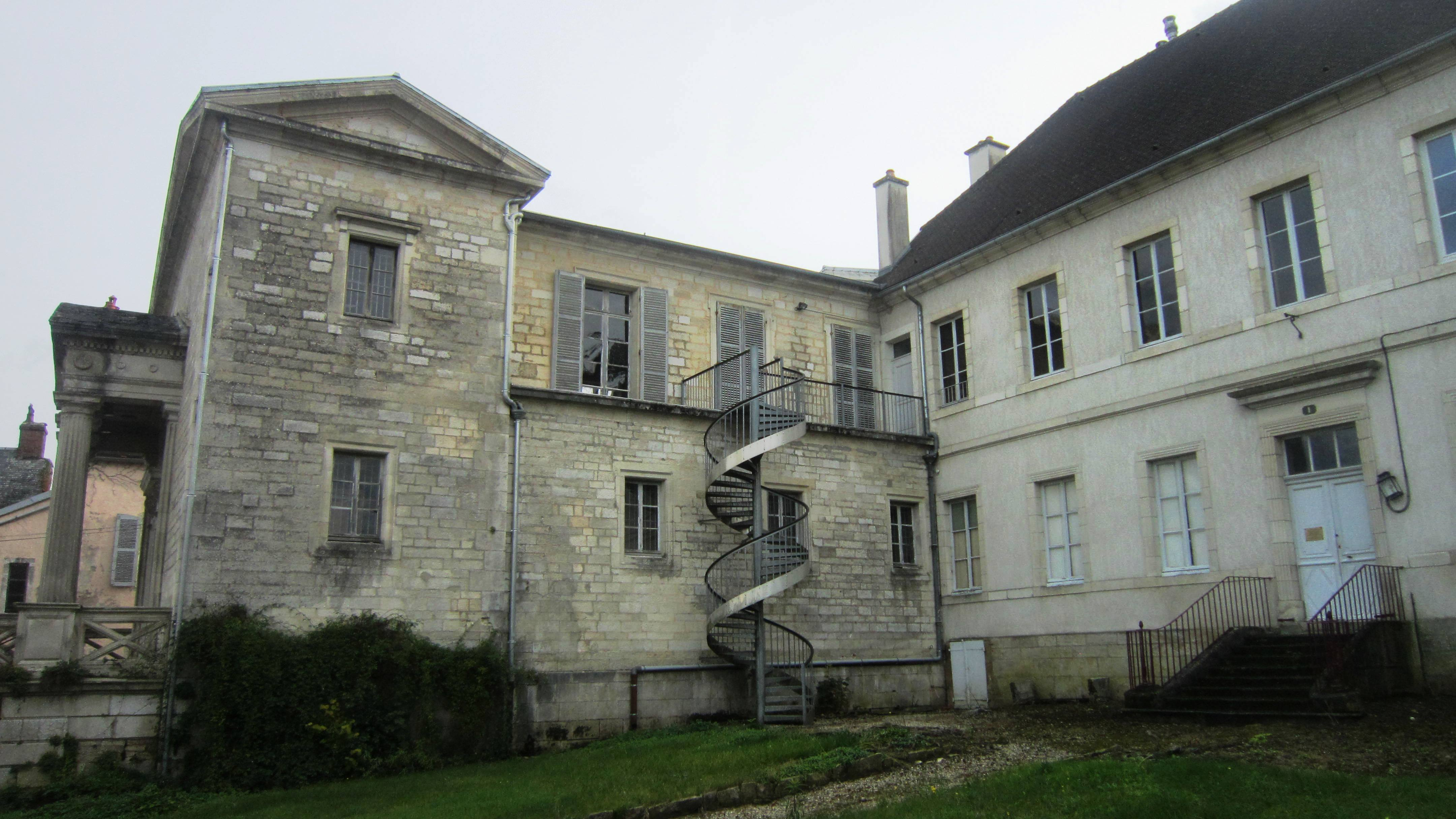 Le tribunal et le carmel de Châtillon-sur-Seine